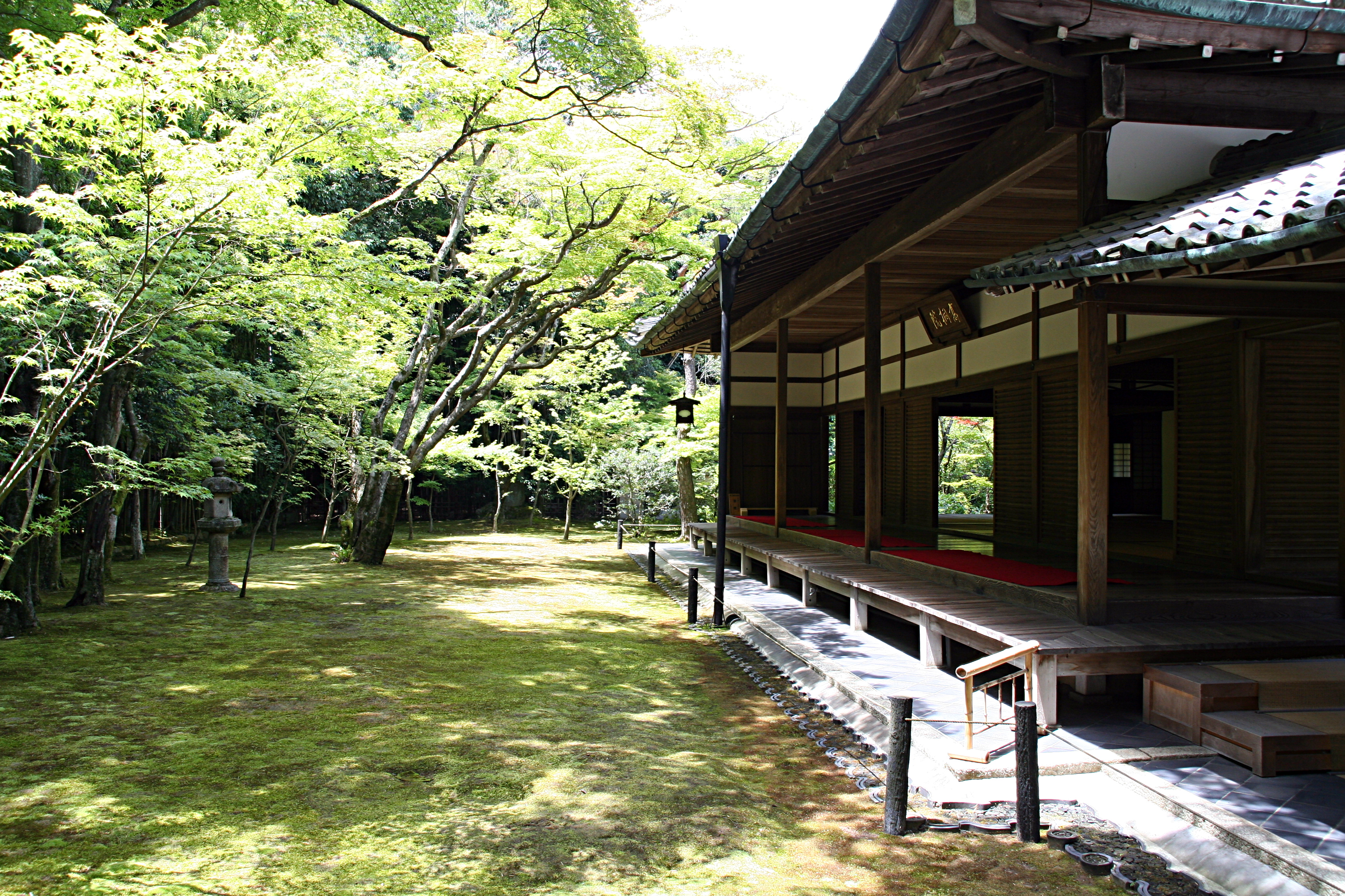 Japan, Kyôto, Daitoku-ji, Kotô-in